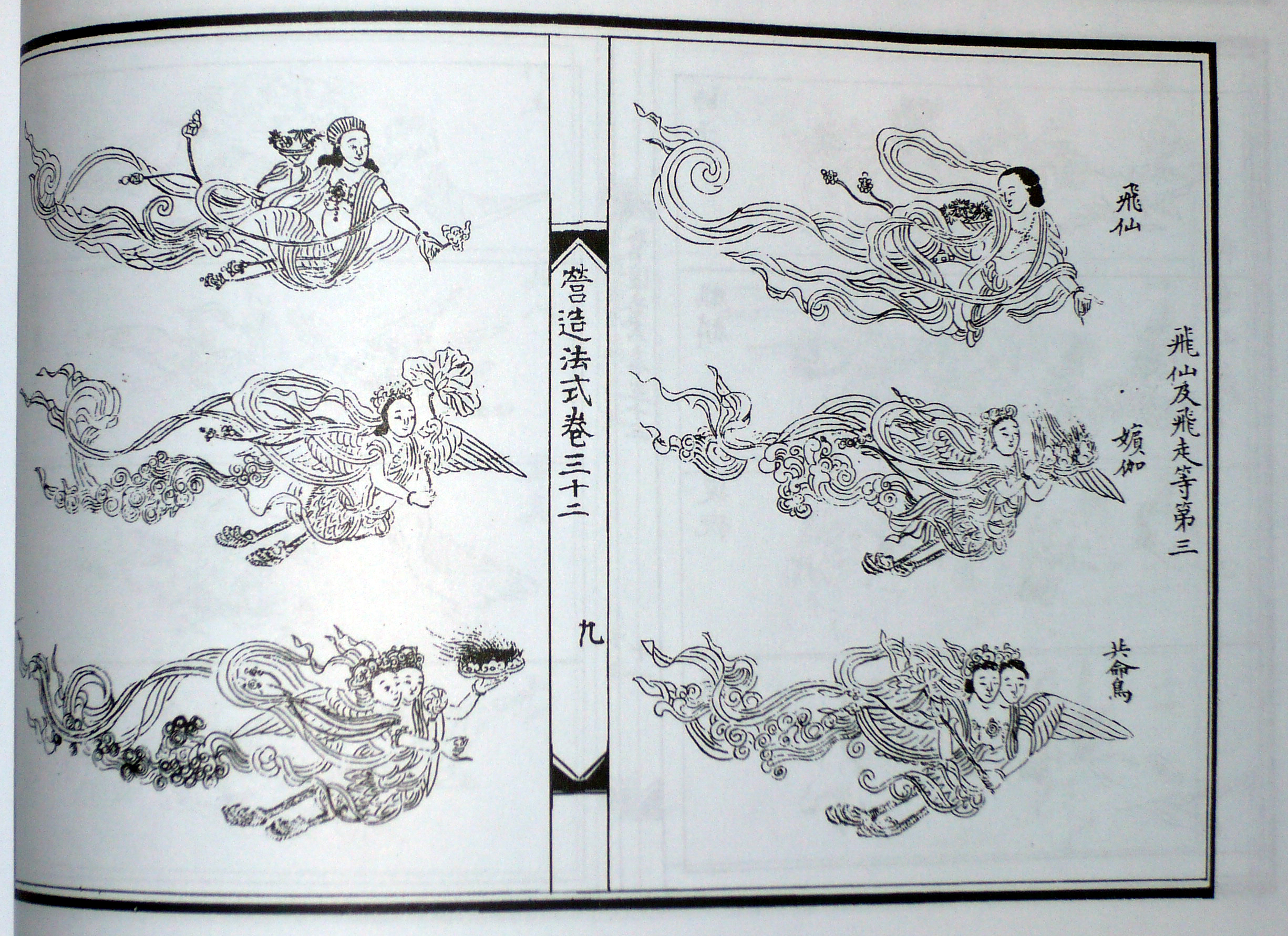 营造法式 飞仙图